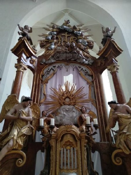 milostný oltář